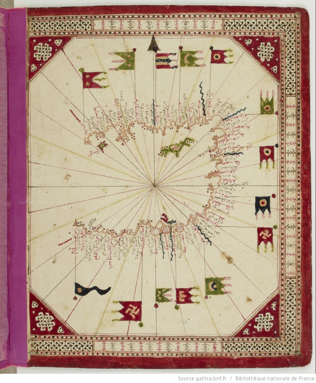 كتاب الطبلة